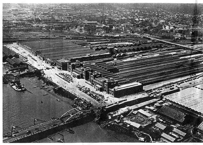 ഹൗറ 1940-ലെ ചിത്രം